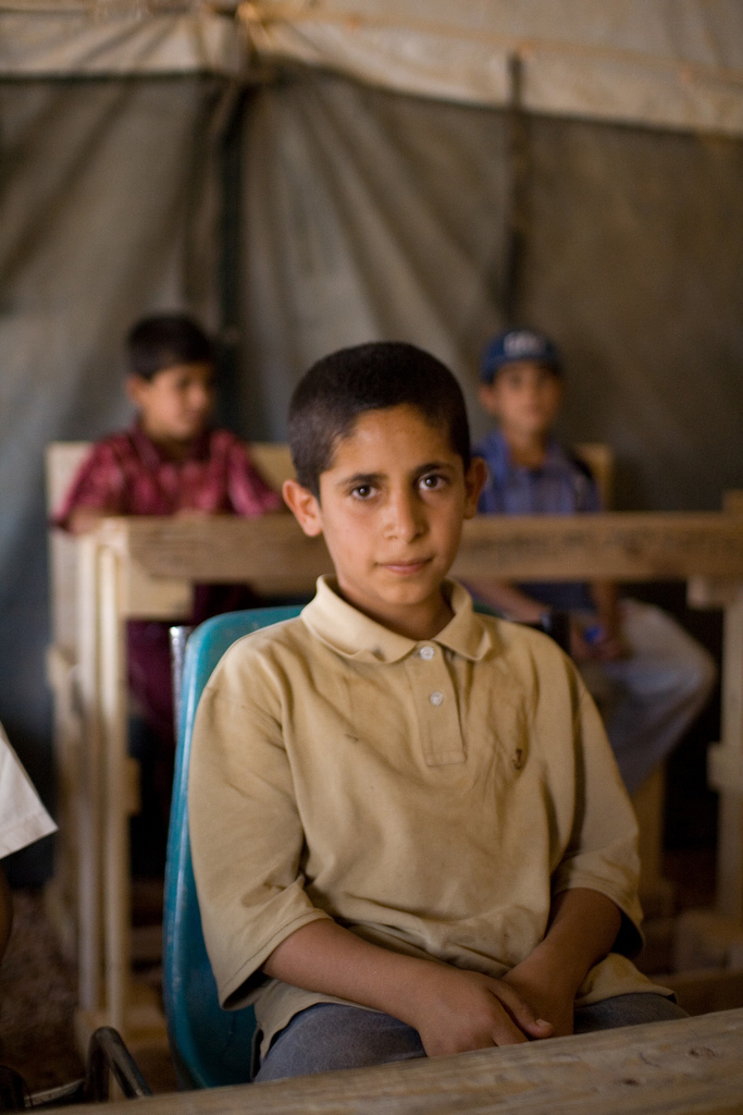 A kurdish schoolboy, Dohuk, Iraqi Kurdistan